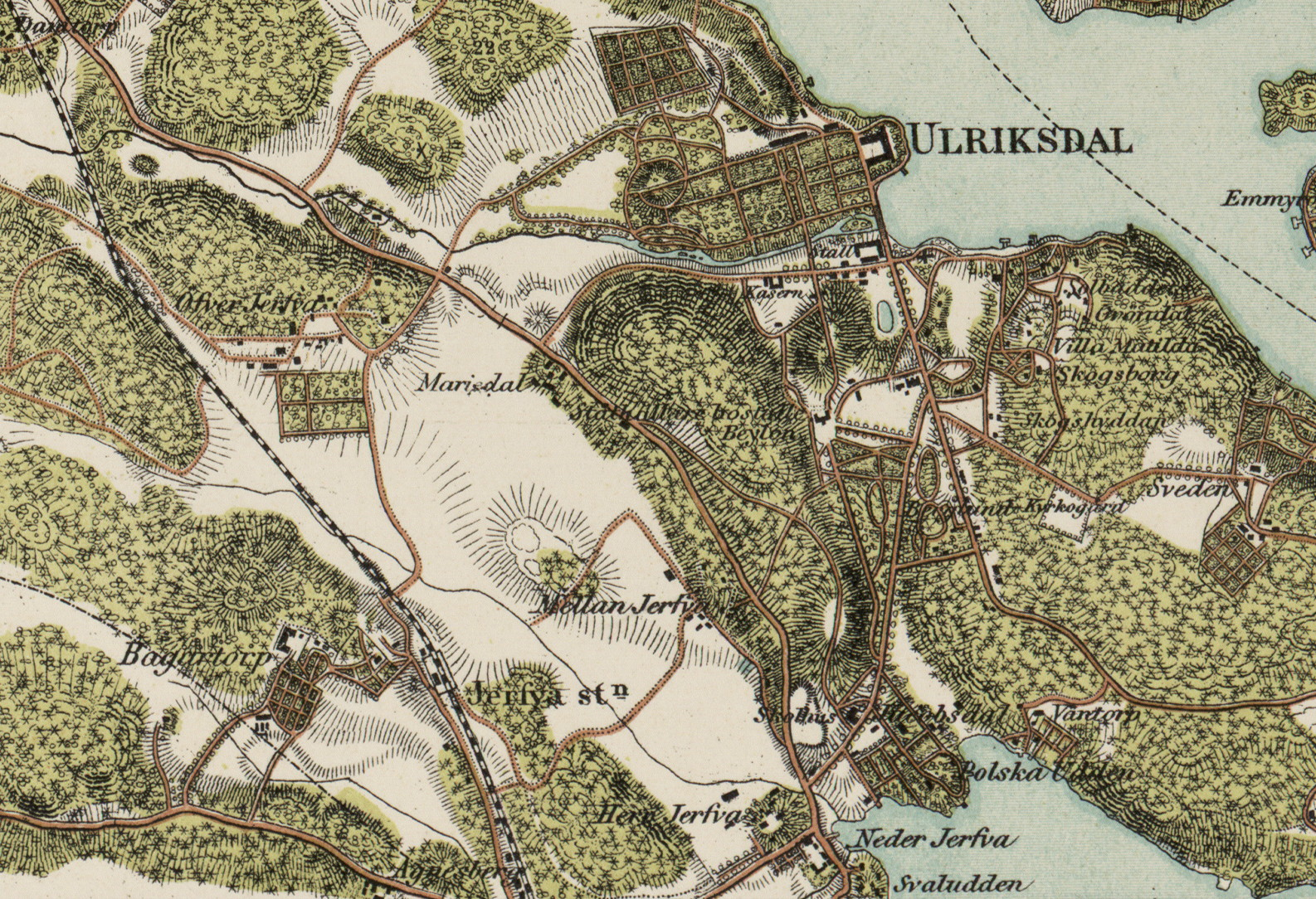 Del av Topografiska corpsens karta visande Övre och Nedre Järva